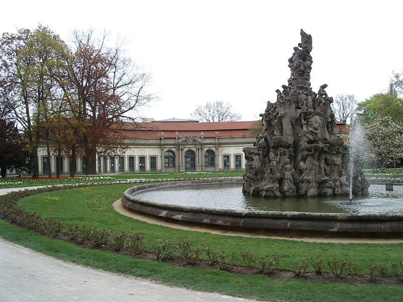 Orangerien im Erlangener Park